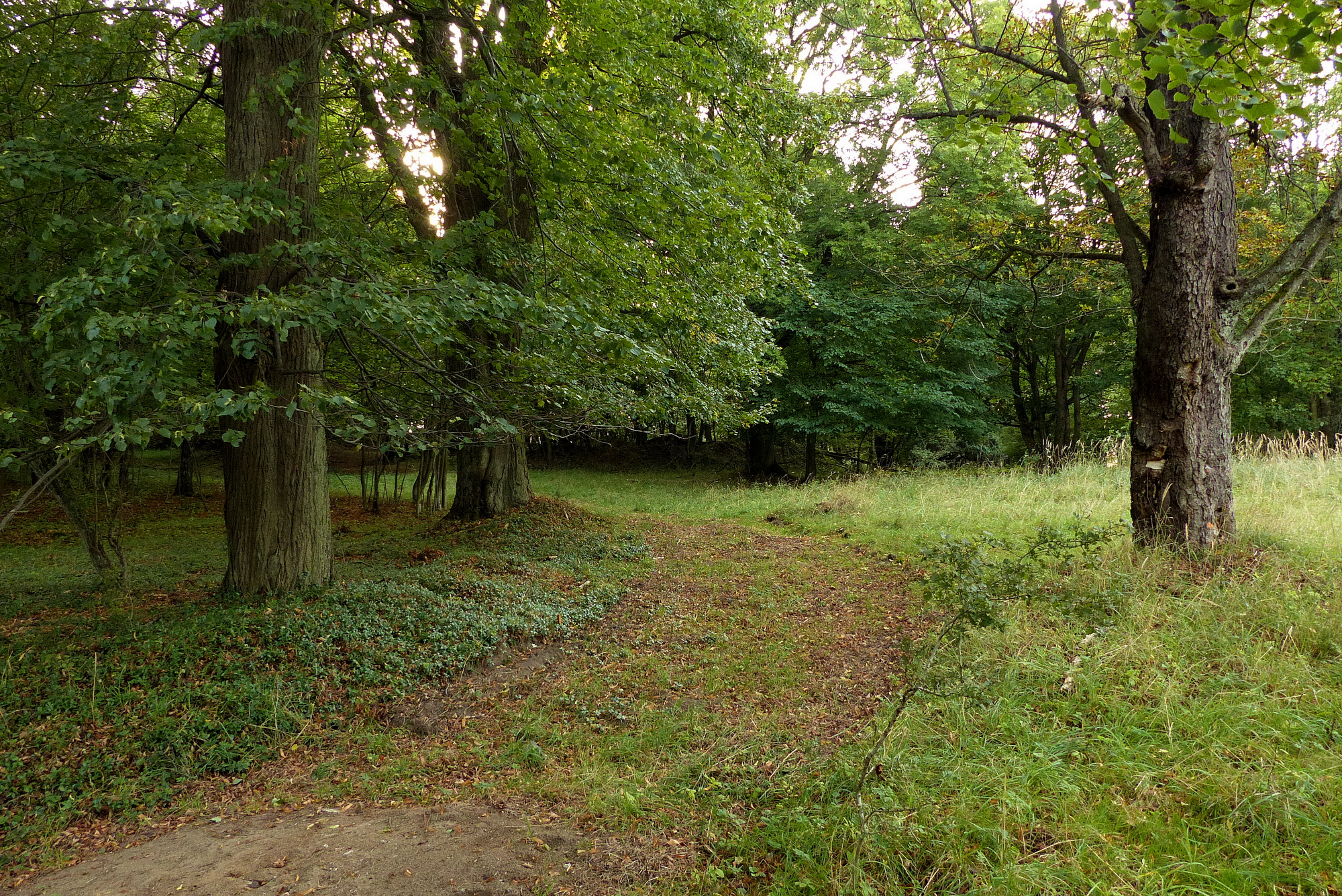 Cesta bývalou Dolní Novinou